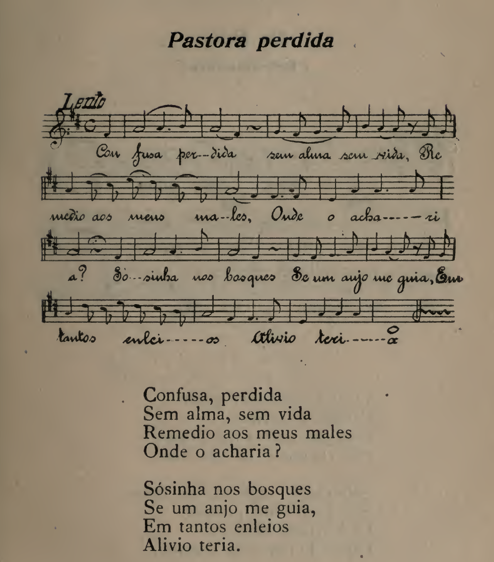 Confusa, perdida, cantiga de Natal tradicional recolhida por Pedro Fernandes Tomás.